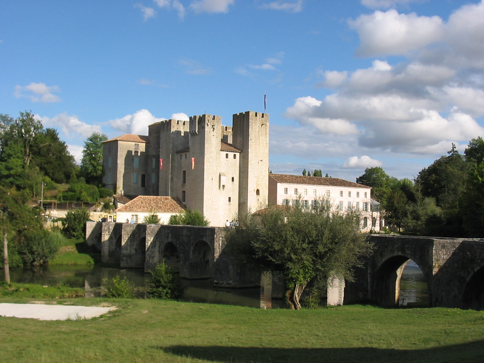 Befestigte Mühle von Barbaste (13.Jh.) mit romanischer Brücke über die Gélise (12.Jh.) Frankreich, Region Aquitanien, Département Lot-et-Garonne, Gemeinde Barbaste